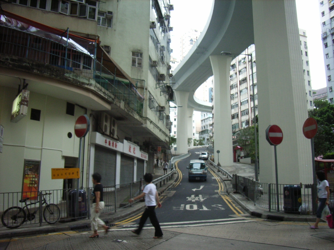 (User:Hillo STT 618) Hill Road, Shek Tong Tsui, Hong Kong